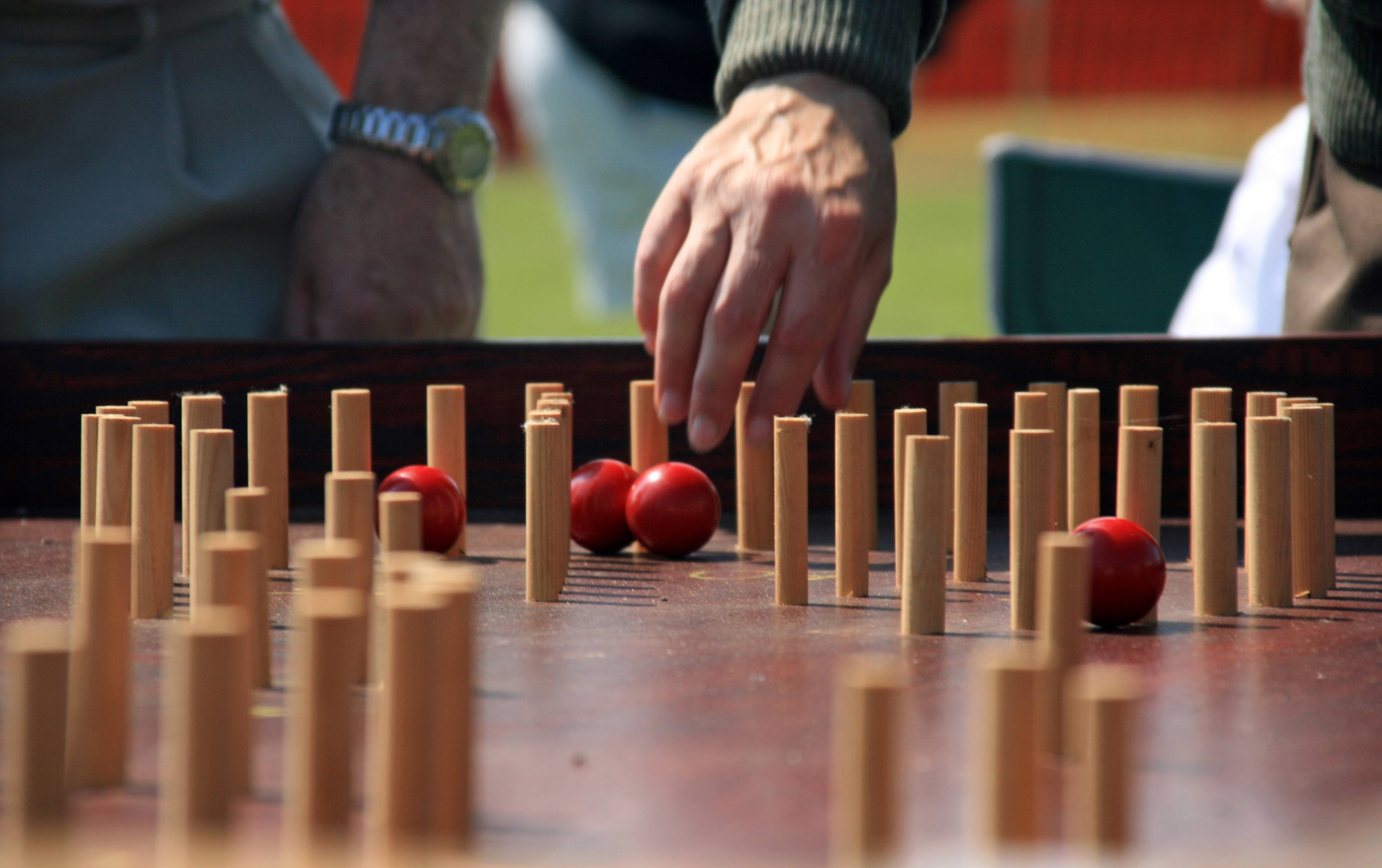 bagatelle